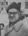 Arkitekten Bertil Thafvelin